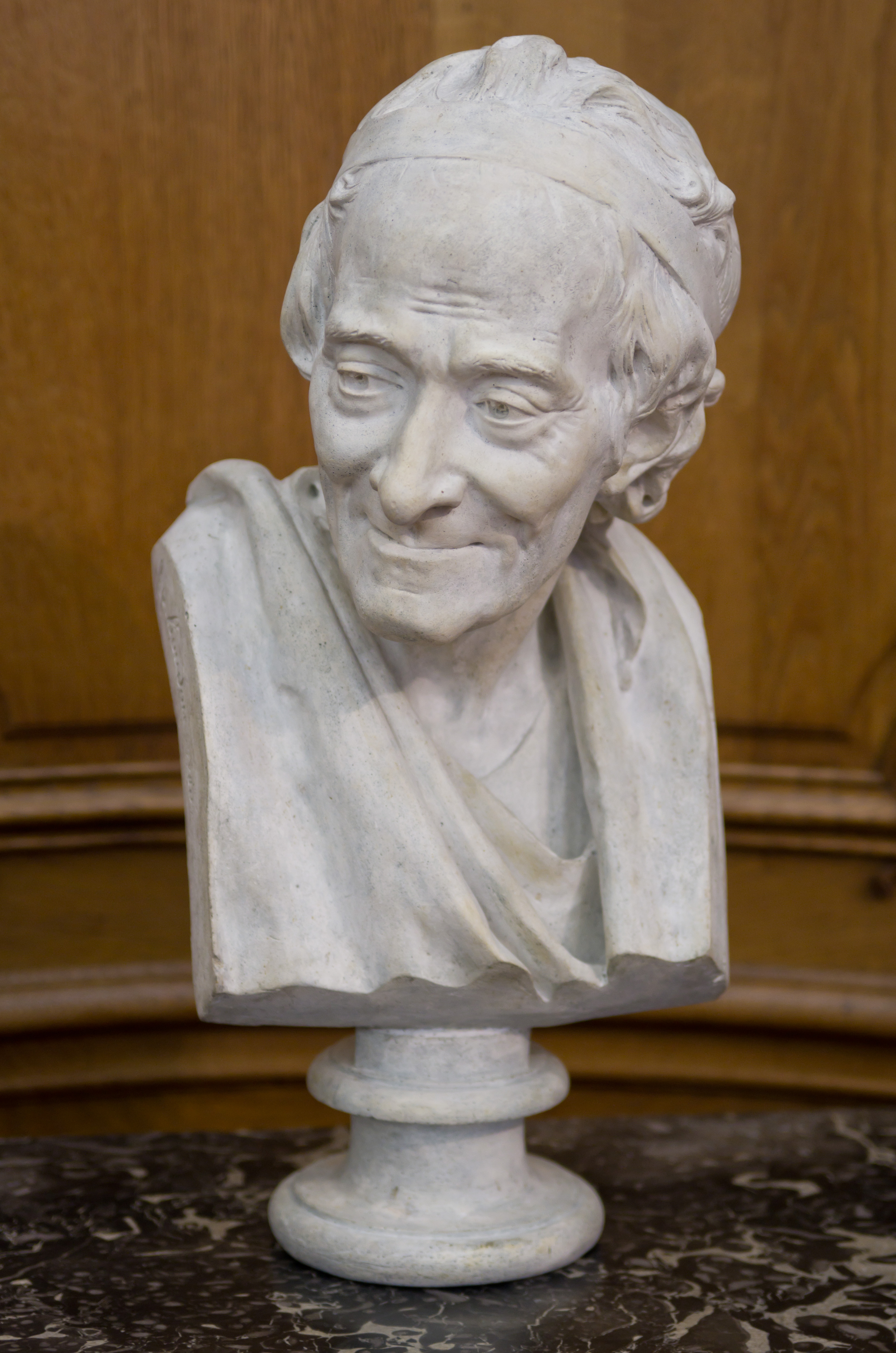 Bust de Voltaire d'aprés un modèle de Jean Antoine Houdon (Platre, exposé au Petit Palais)